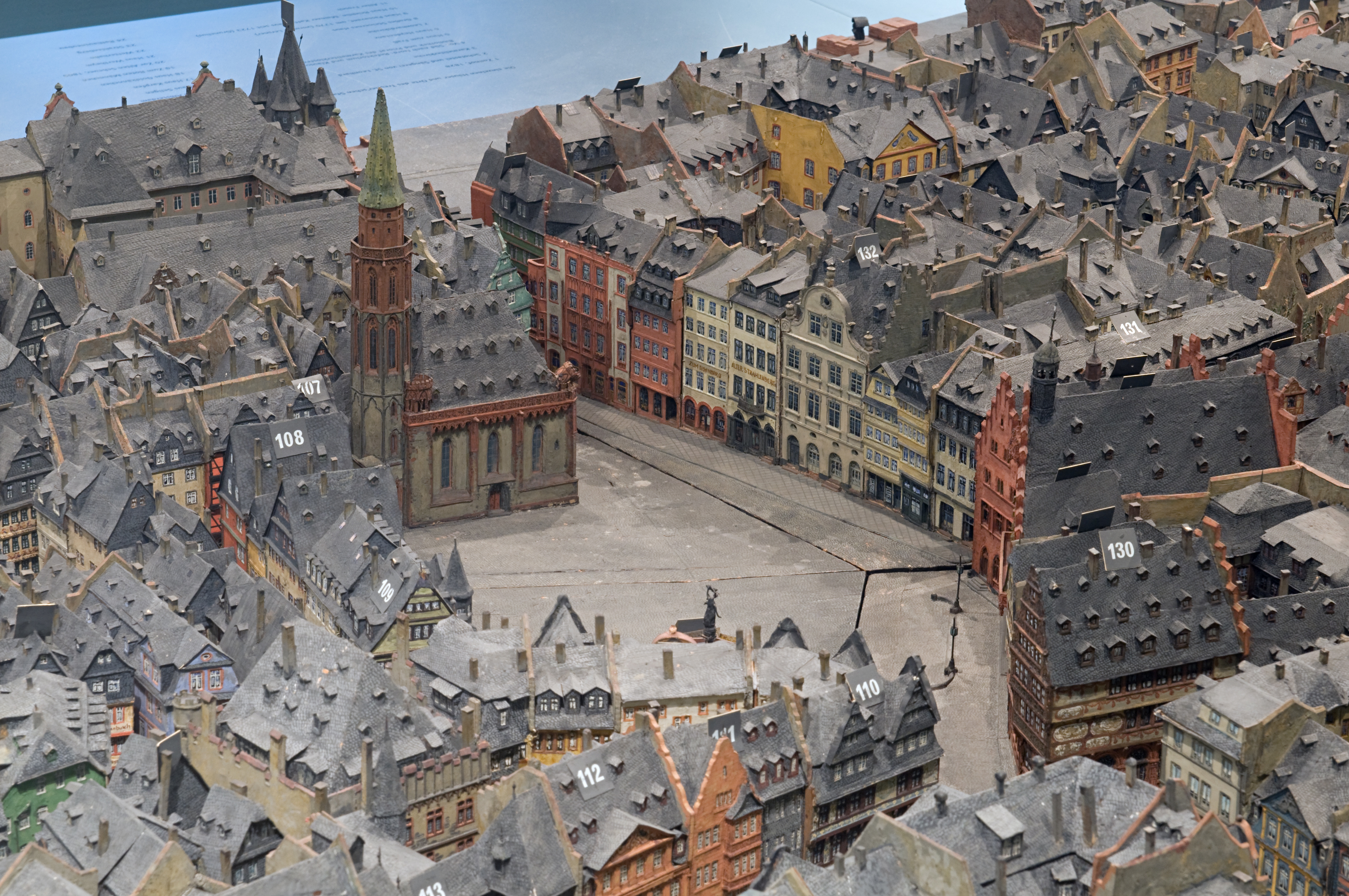 Historisches Museum Frankfurt am Main Altstadtmodell der Brüder Treuner Römerberg und Nikolaikirche